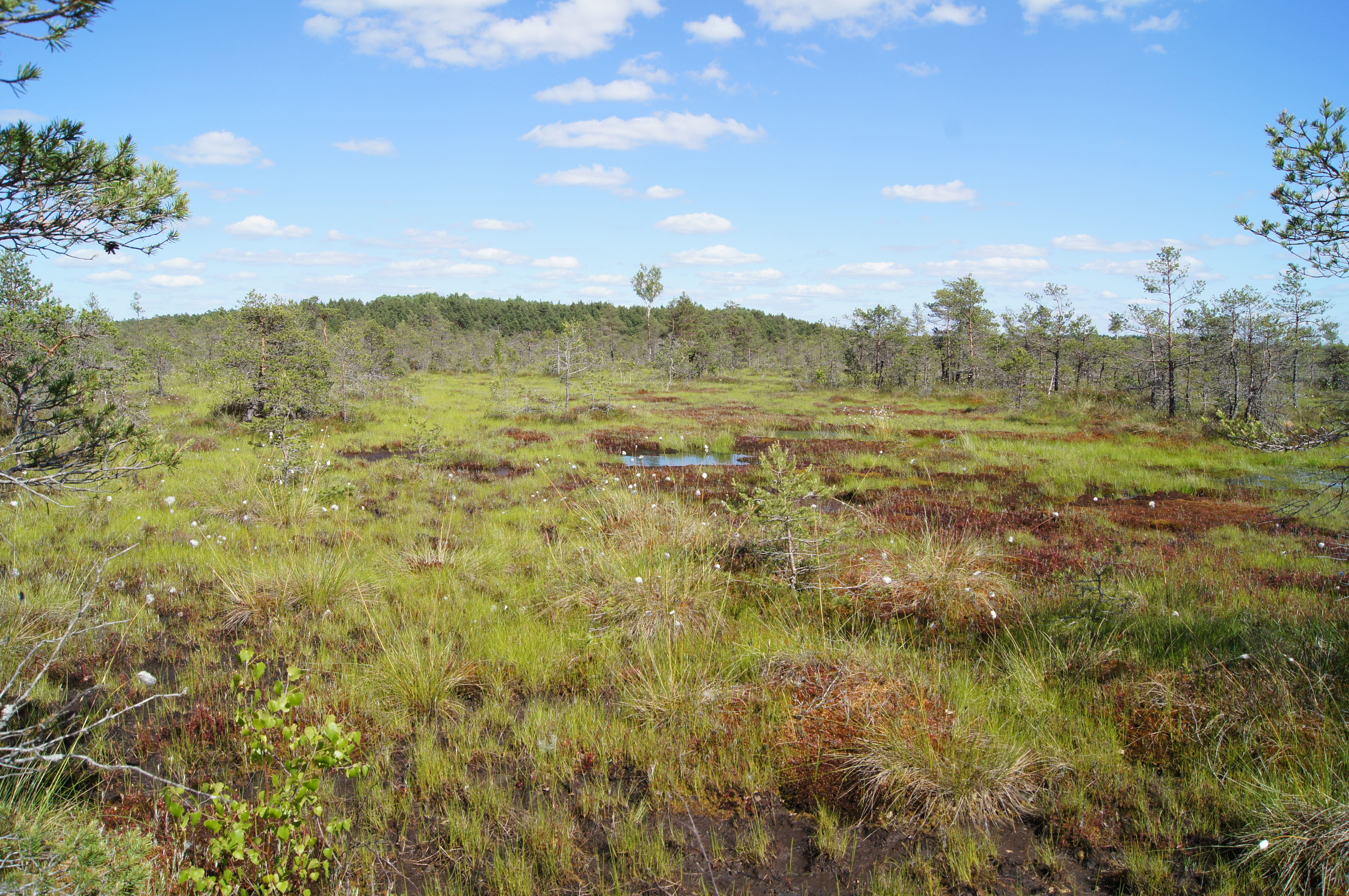 Kamanų pelkė